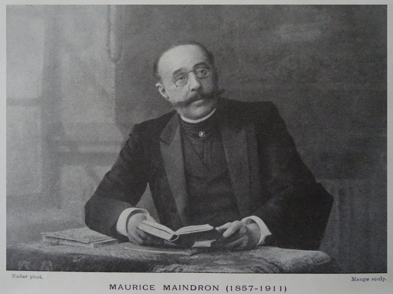 Portrait de Maurice Maindron (1857-1911) par Nadar.